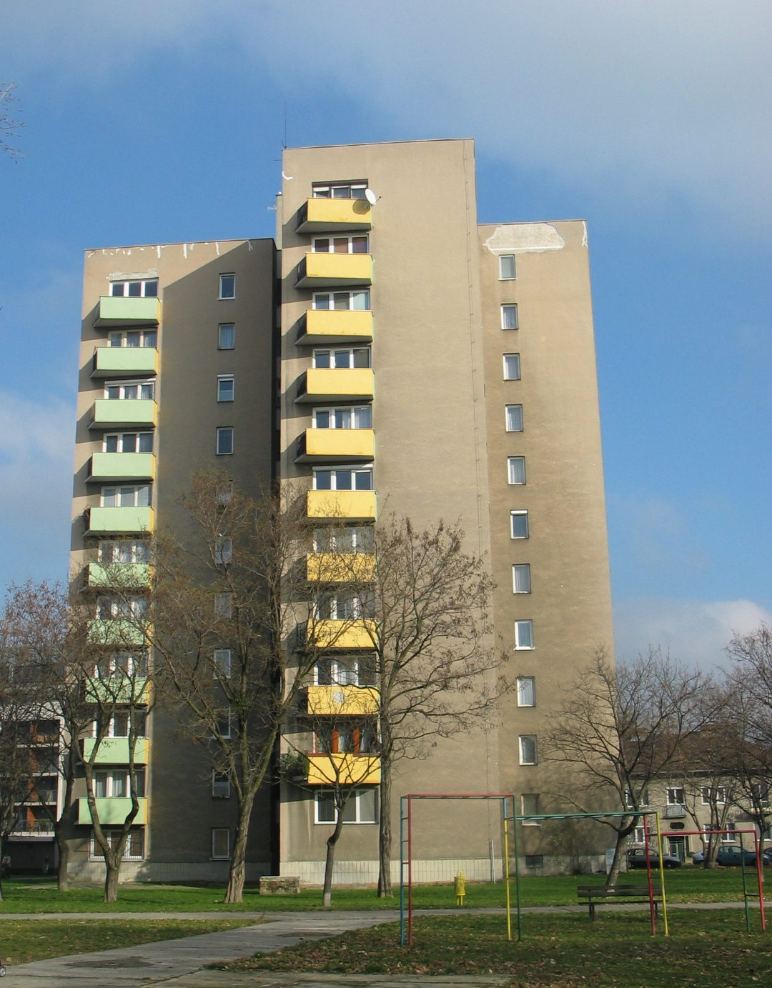 vežový dom Miletičova 1957